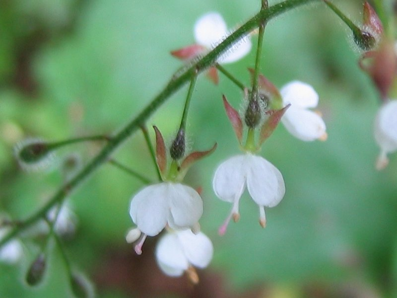 Blüte des Großen Hexenkrautes Circaea lutetiana